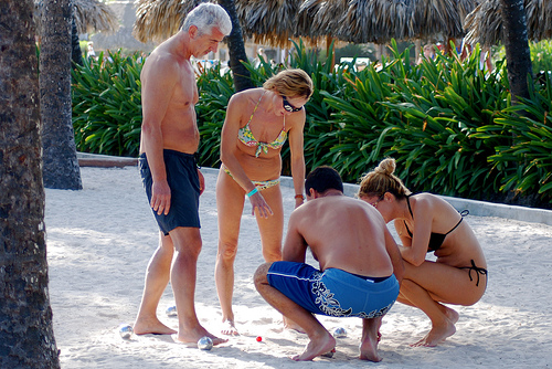 Pétanque Pétanque Club Med 2007 - 186 Here are another couple of couples, busily playing a game of petanque down by the beach. I don't know the rules of the game, but I think the little tiny red ball has some special significance...